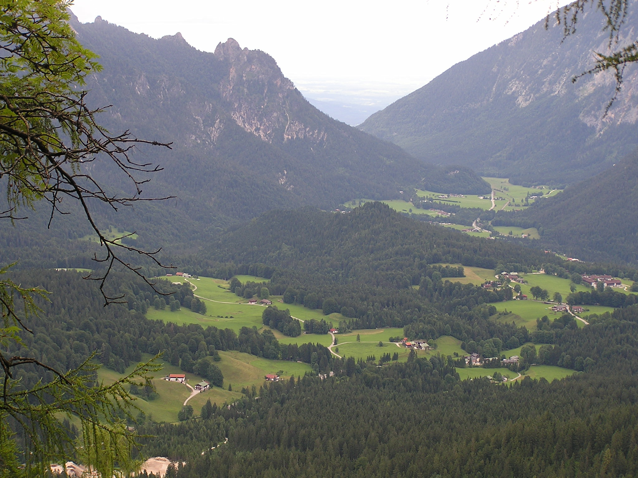 Die Gnotschaft Loipl liegt auf ca. 850m Meereshöhe, im Hintergrund ist die "Schlafende Hexe", der Einschnitt des Pass Hallthurm und rechts der Untersberg zu sehen. Das Foto ist vom "Toten Mann" aus in Richtung Nord/Ost aufgenommen.